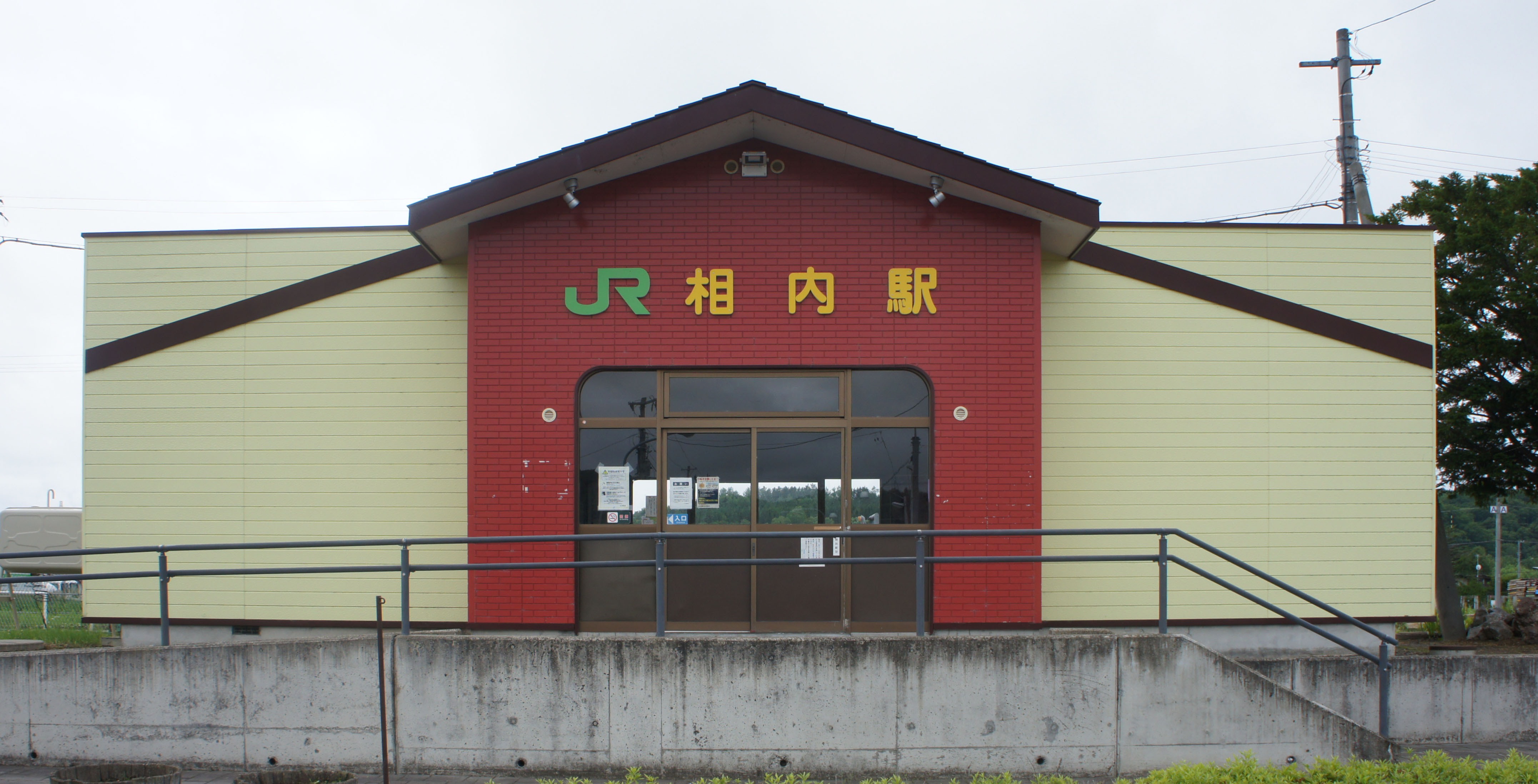 JR石北本線・相内駅の駅舎